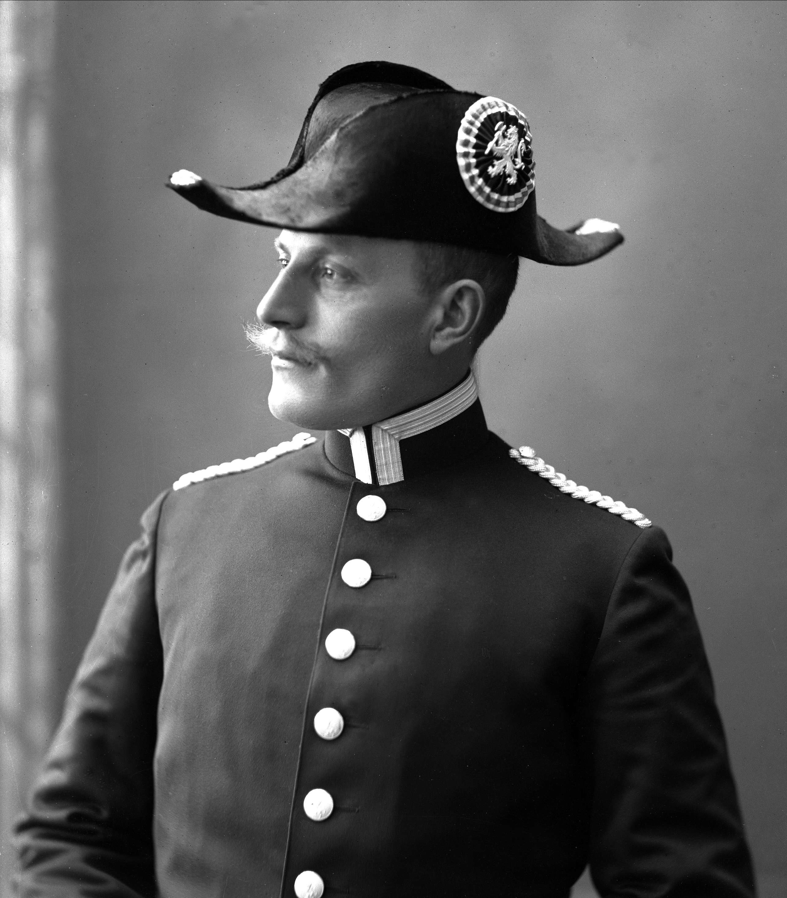 Holmvaag, knekt ved Det konglige slott i Oslo.